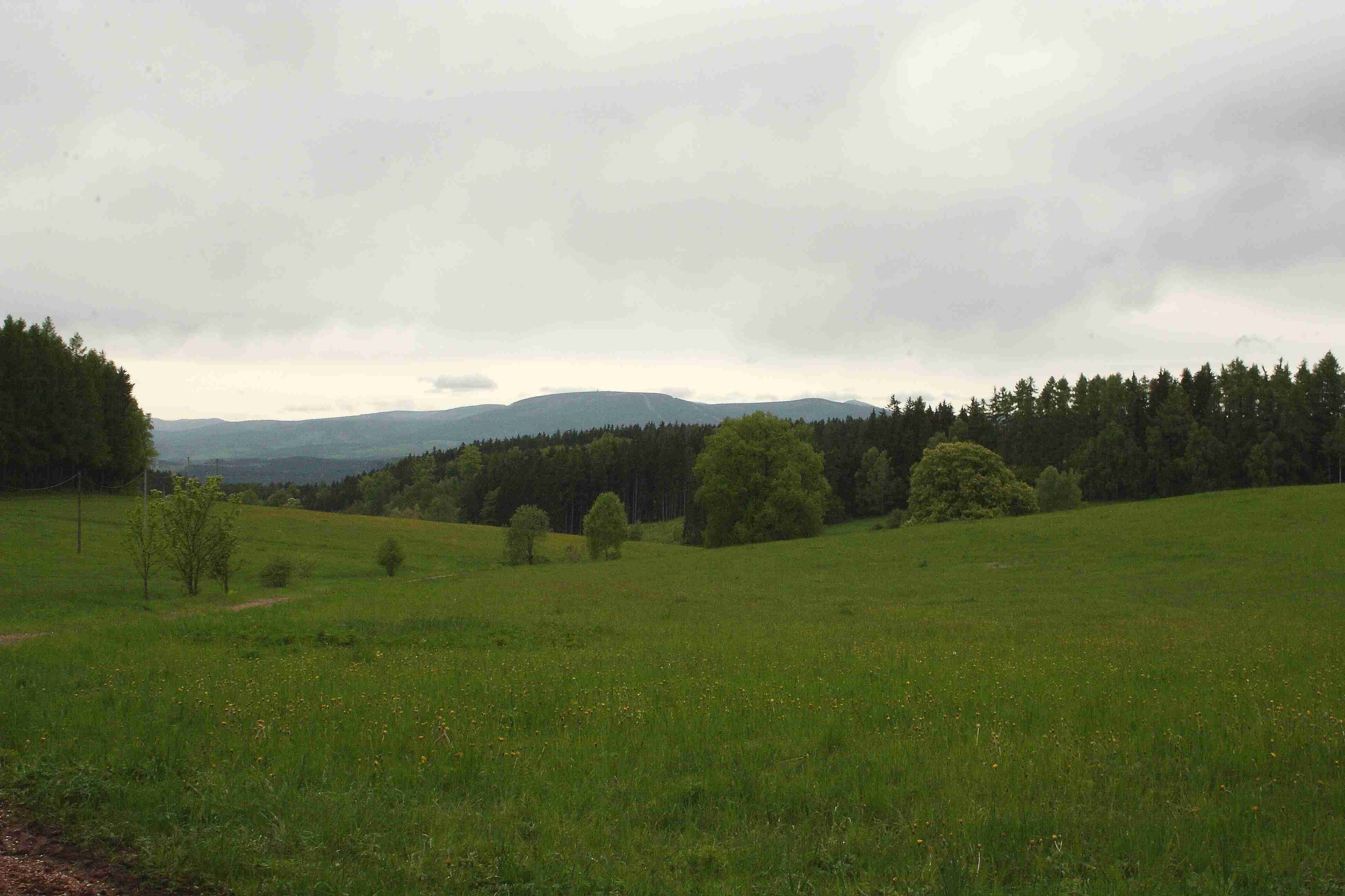 Olimberk